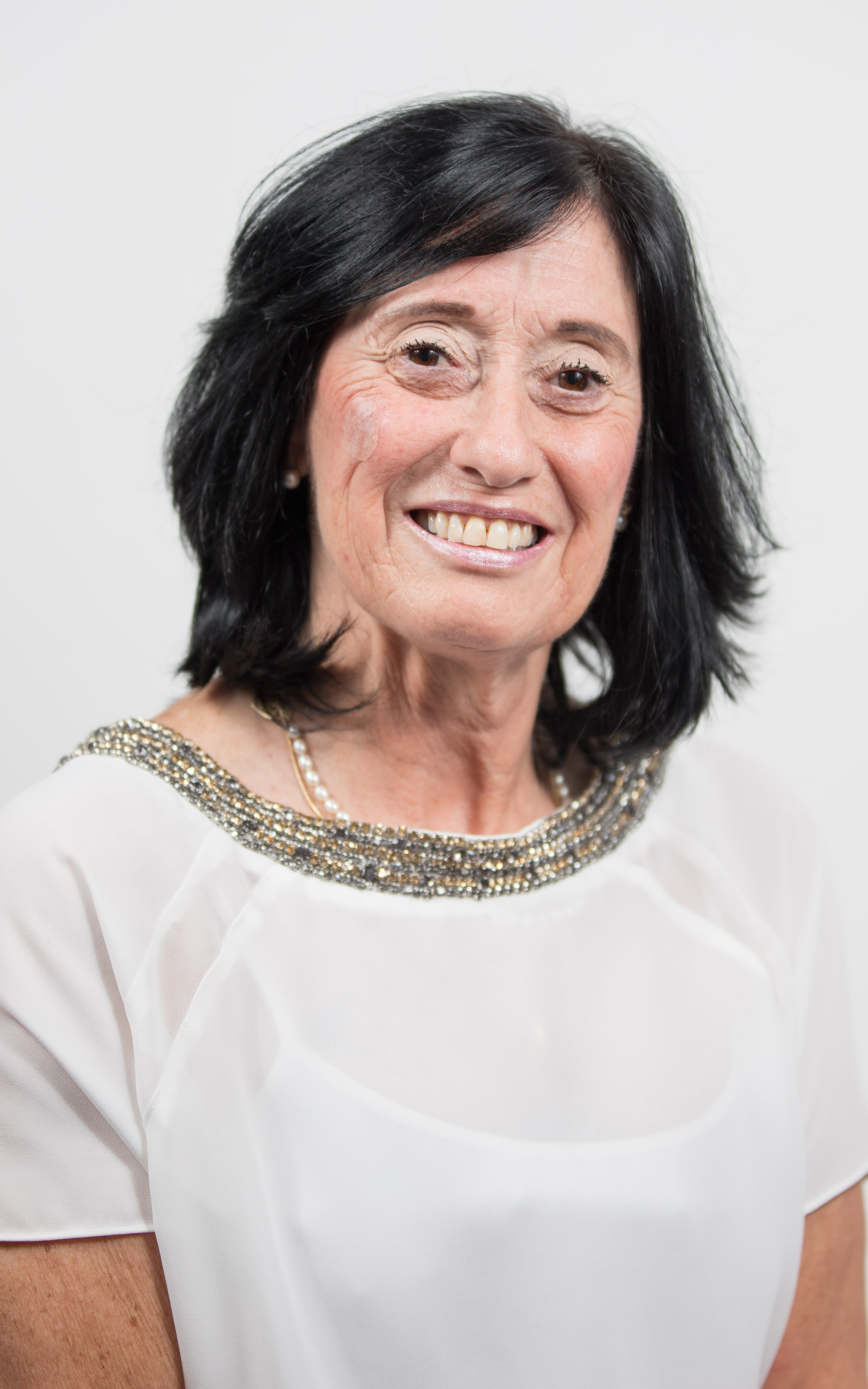 Foto oficial de Célia Leão, secretária de Direitos da Pessoa com Deficiência do estado de São Paulo.